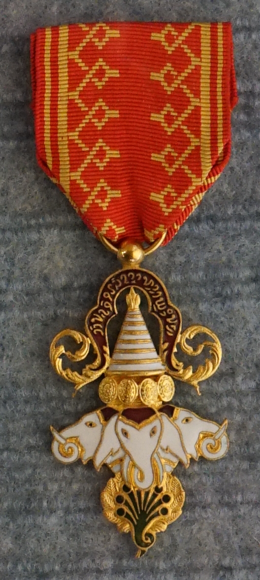 présenté au musée de Toul.